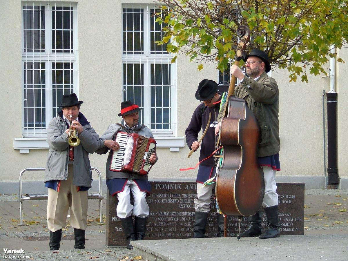 Ażeby zatańczyć, trzeba zagrać.